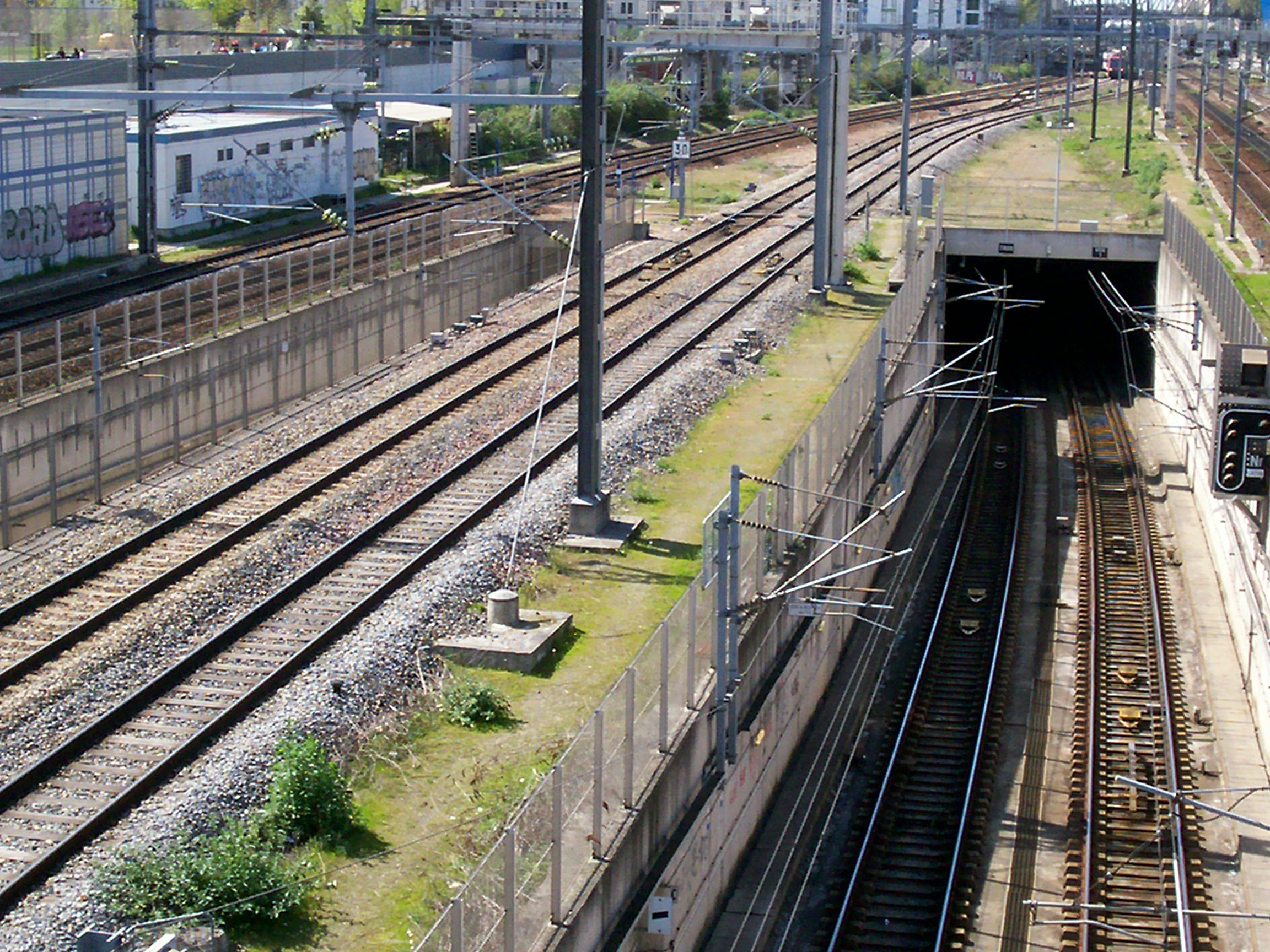 RER E - Sortie du tunnel parisien EOLE